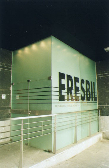 Entrada de la actual sede del archivo Eresbil